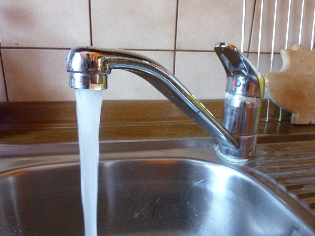 Ein drehbarer Wasserhahn mit Einhebelmischer